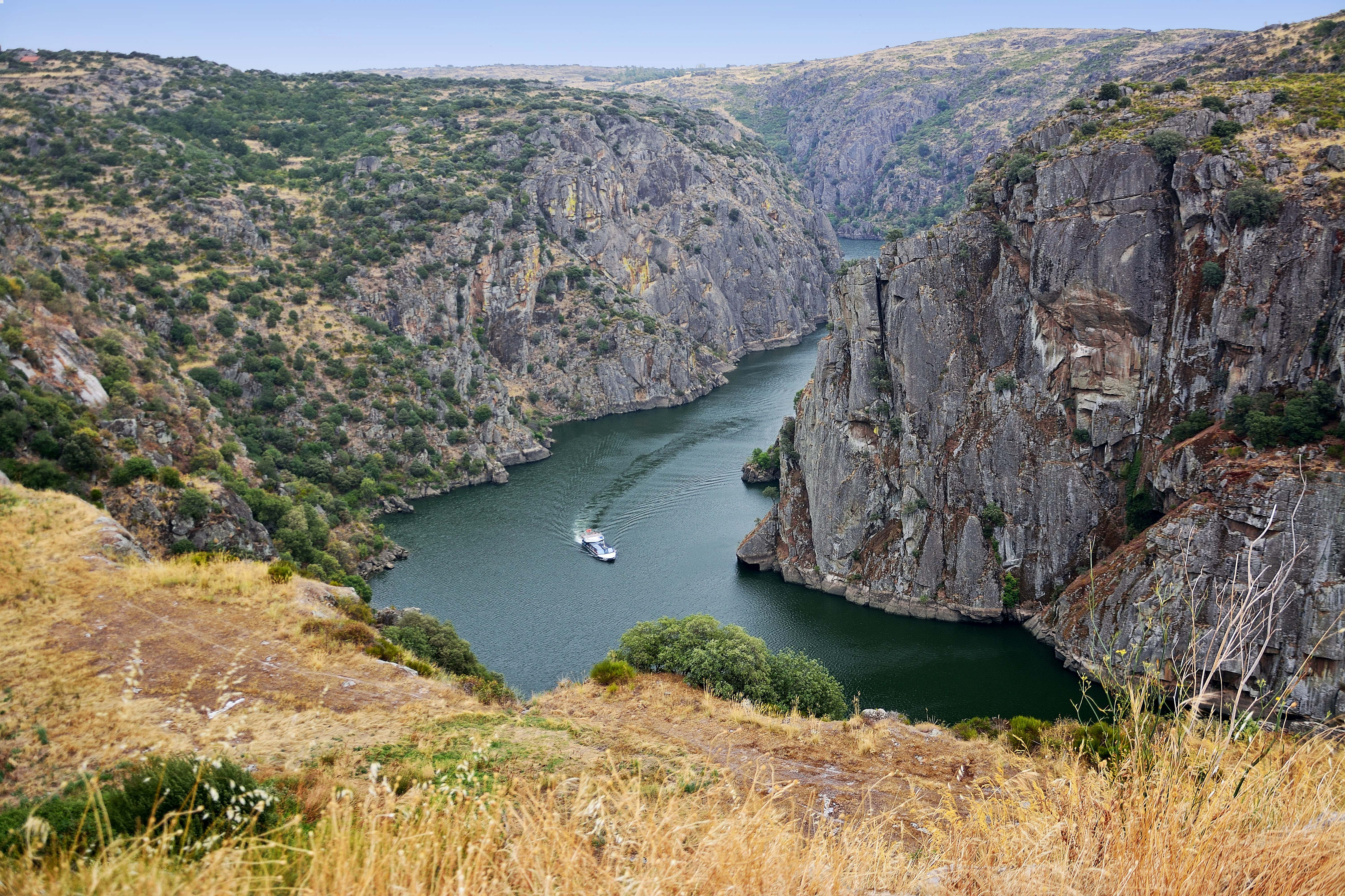 Arribes del Duero. Catamarán de la Estación Internacional de Miranda Do Douro. This is a photography of a Special Area of Conservation in Spain with the ID: ES4150096. Natura2000 entry, EEA entry This is a photography of a Site of Community Importance in Portugal with the ID: PTCON0022. Natura2000 entry, EEA entry